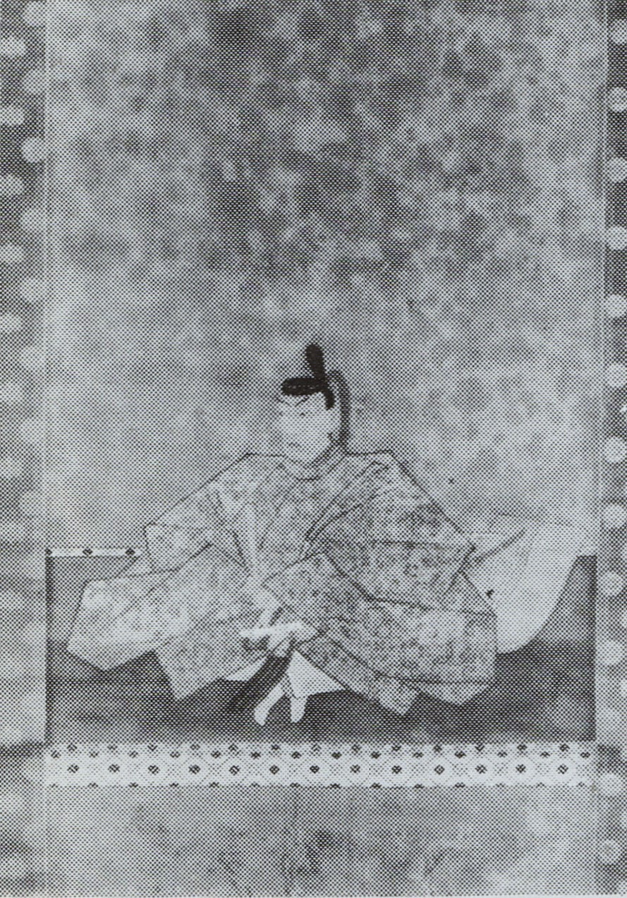 相良頼峯の肖像(モノクロ)。